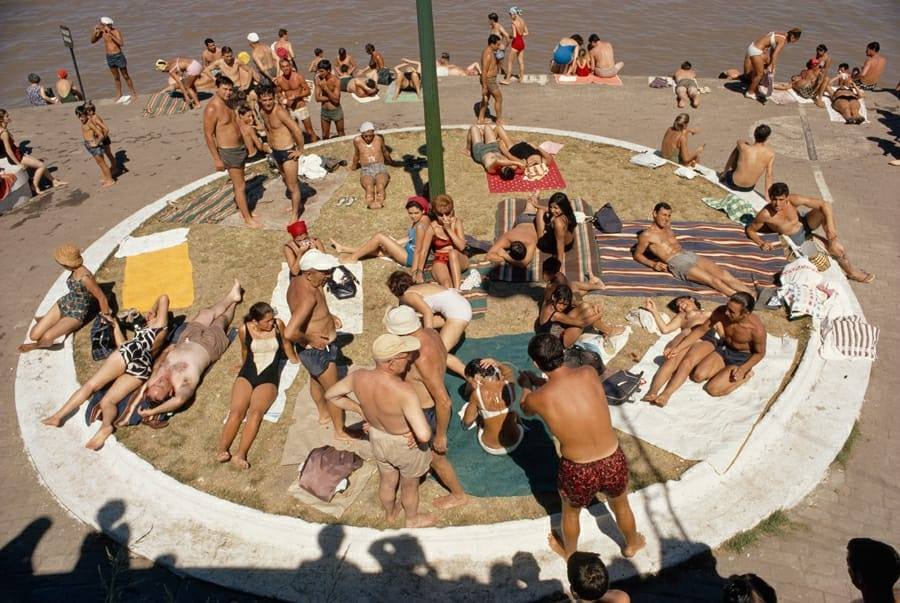 Porteños en el verano de 1967 tomando sol en el sector de la Costanera Norte denominado irónicamente "Saint Tropez".